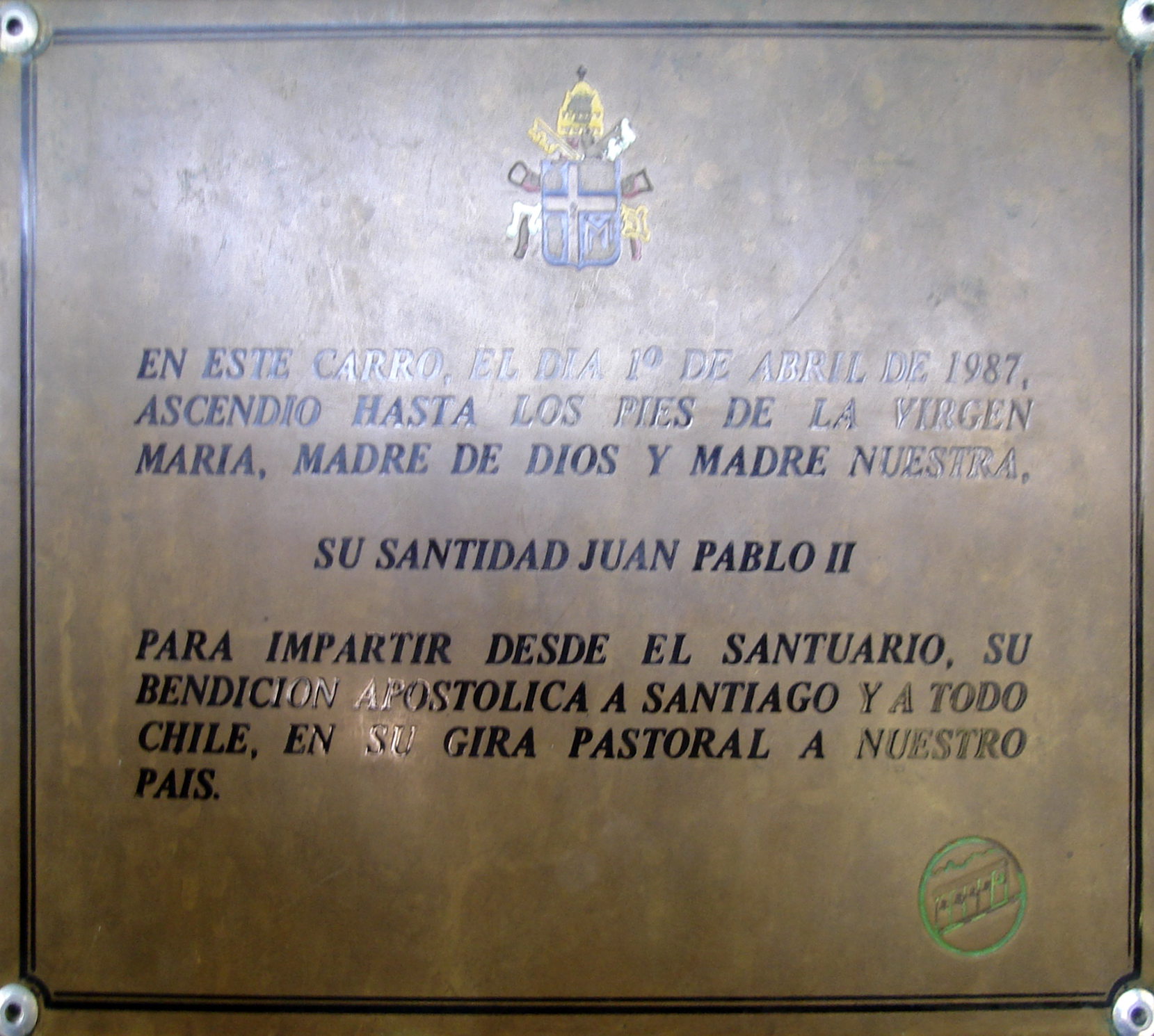 Placa en el Funicular de Santiago, Chile, que conmemora la visita a ese país del Papa Juan Pablo II en 1987.